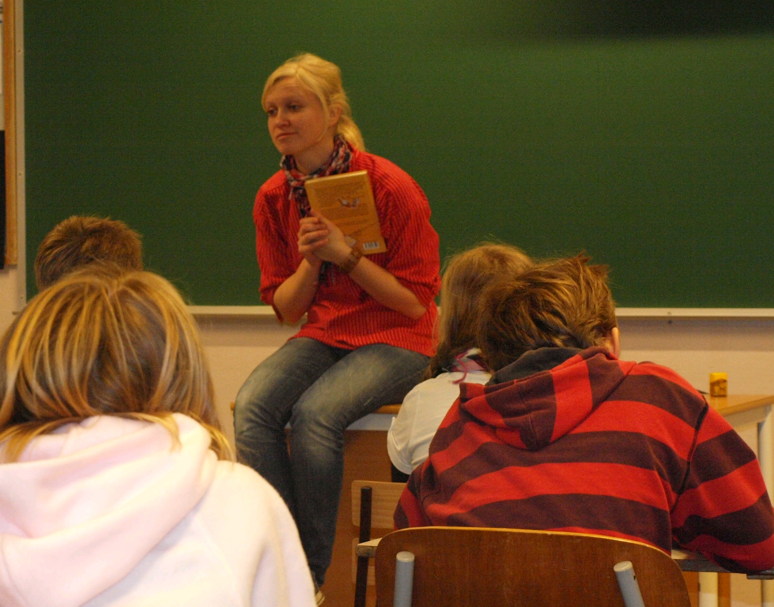 Norsk barnebokforfattar Maria Parr les i ei skuleklasse